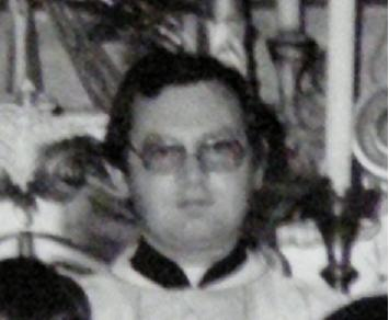 The istvánfalvian Priest István Tóth (1955-2001)